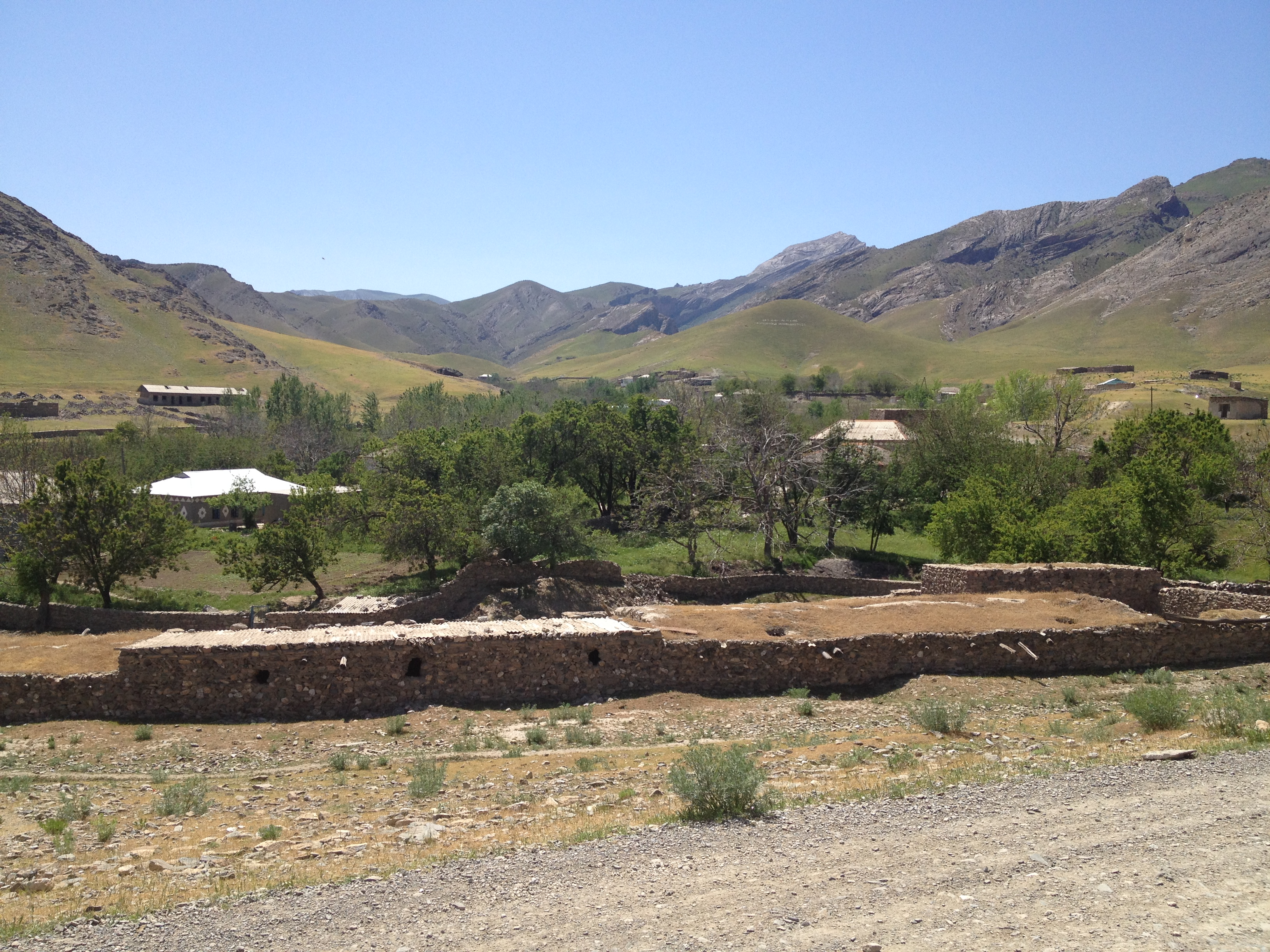 Кишлак Сап, горы Нуратау